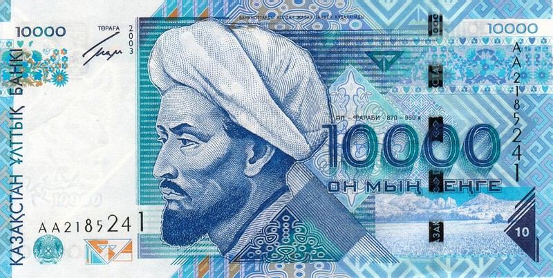 10.000 tenge